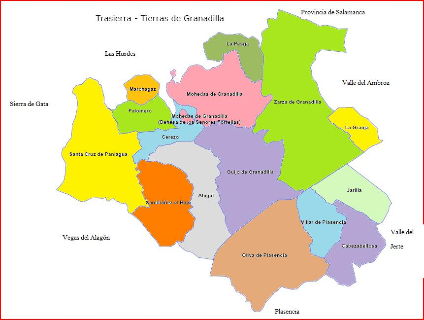 Mapa con los términos municipales de la Mancomunidad de Municipios Trasierra-Tierras de Granadilla